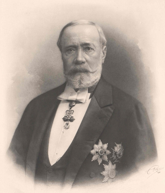 Jan Nepomuk František Harrach (1828–1909)